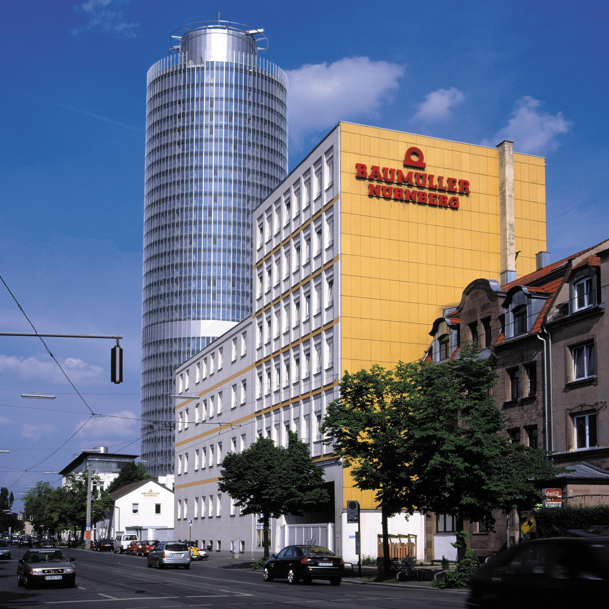 Stammsitz der Firma Baumüller in Nürnberg, Verwaltungsgebäude.